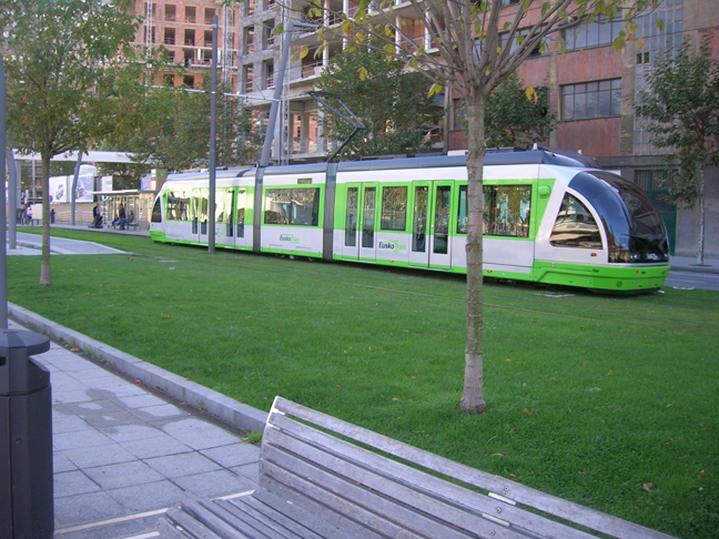 Bilboko tranbia.